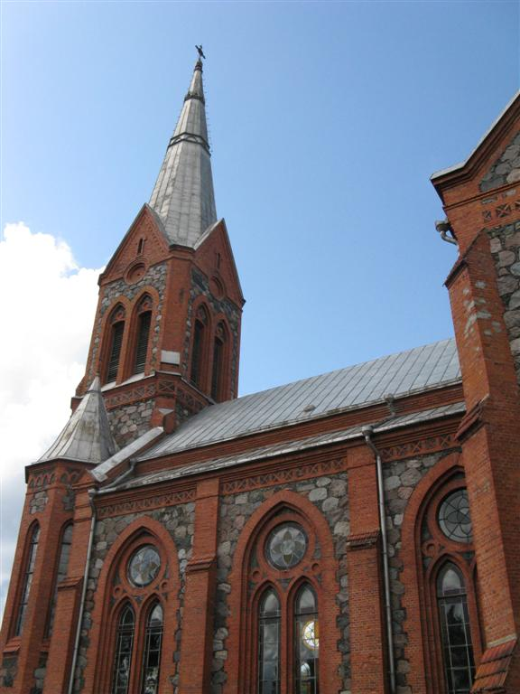 Žiobiškio Šv. arkangelo Mykolo bažnyčia